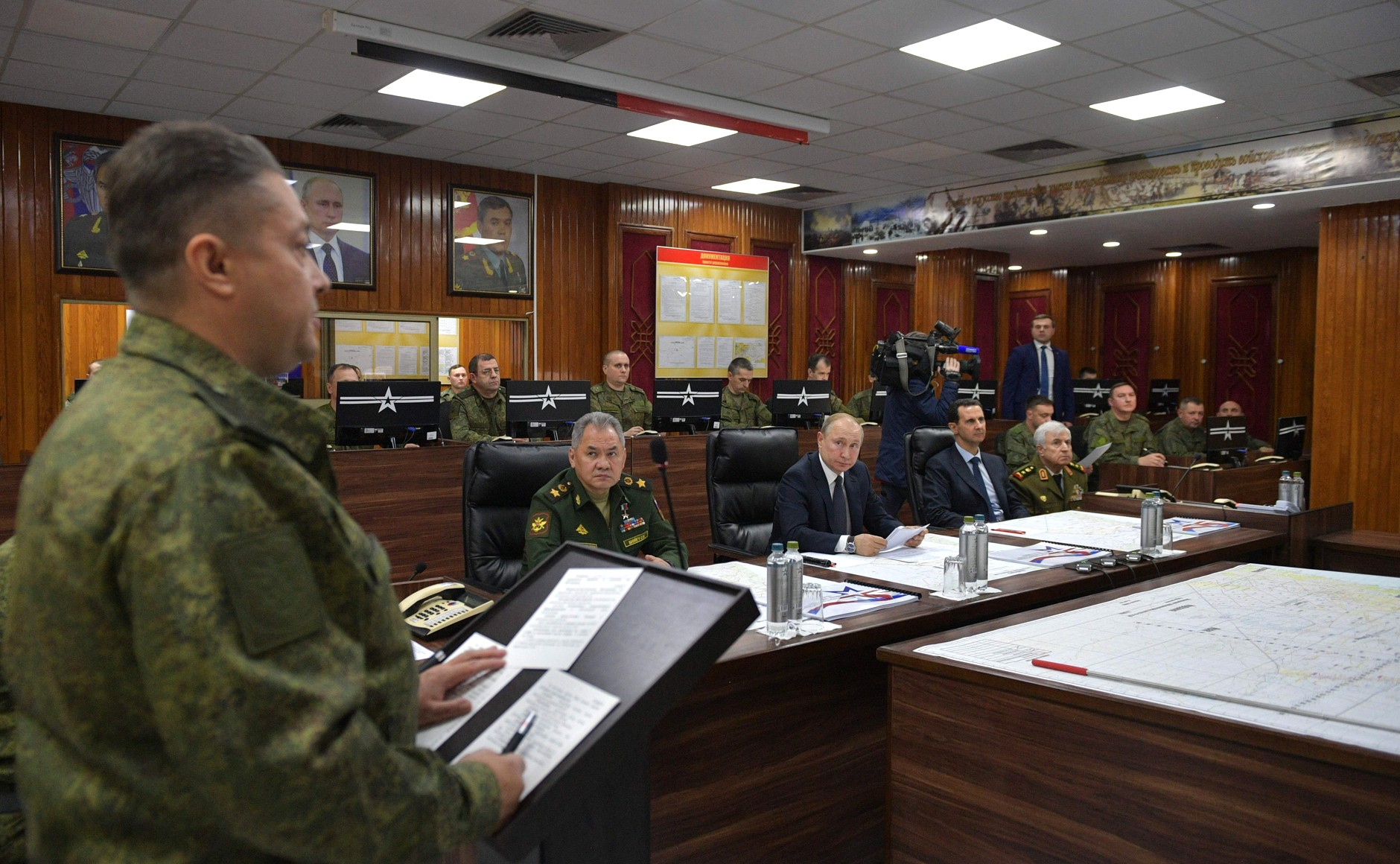 Владимир Путин посетил командный пункт группировки Вооружённых Сил России в Сирии. Глава Российского государства и Президент Сирии Башар Асад заслушали доклады военных о положении дел в различных регионах республики